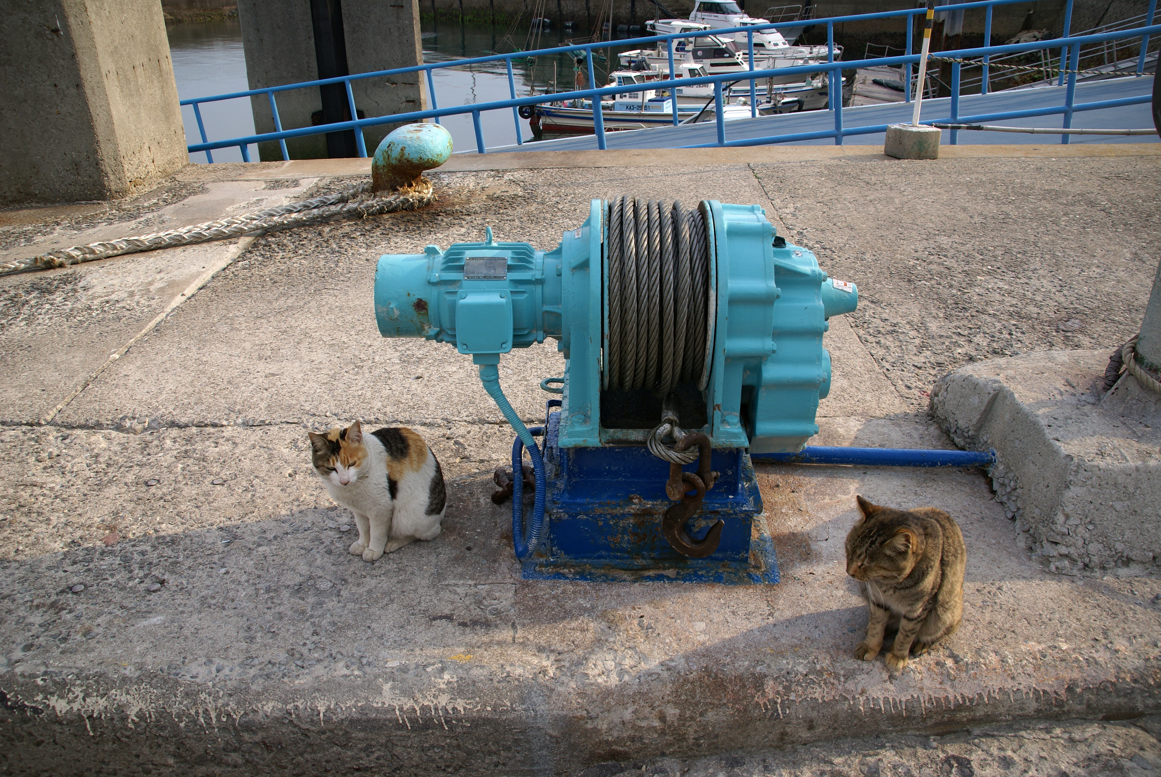 Honjima port, Hon-jima of Shiwaku Islands (Marugame, Kagawa prefecture, Japan)